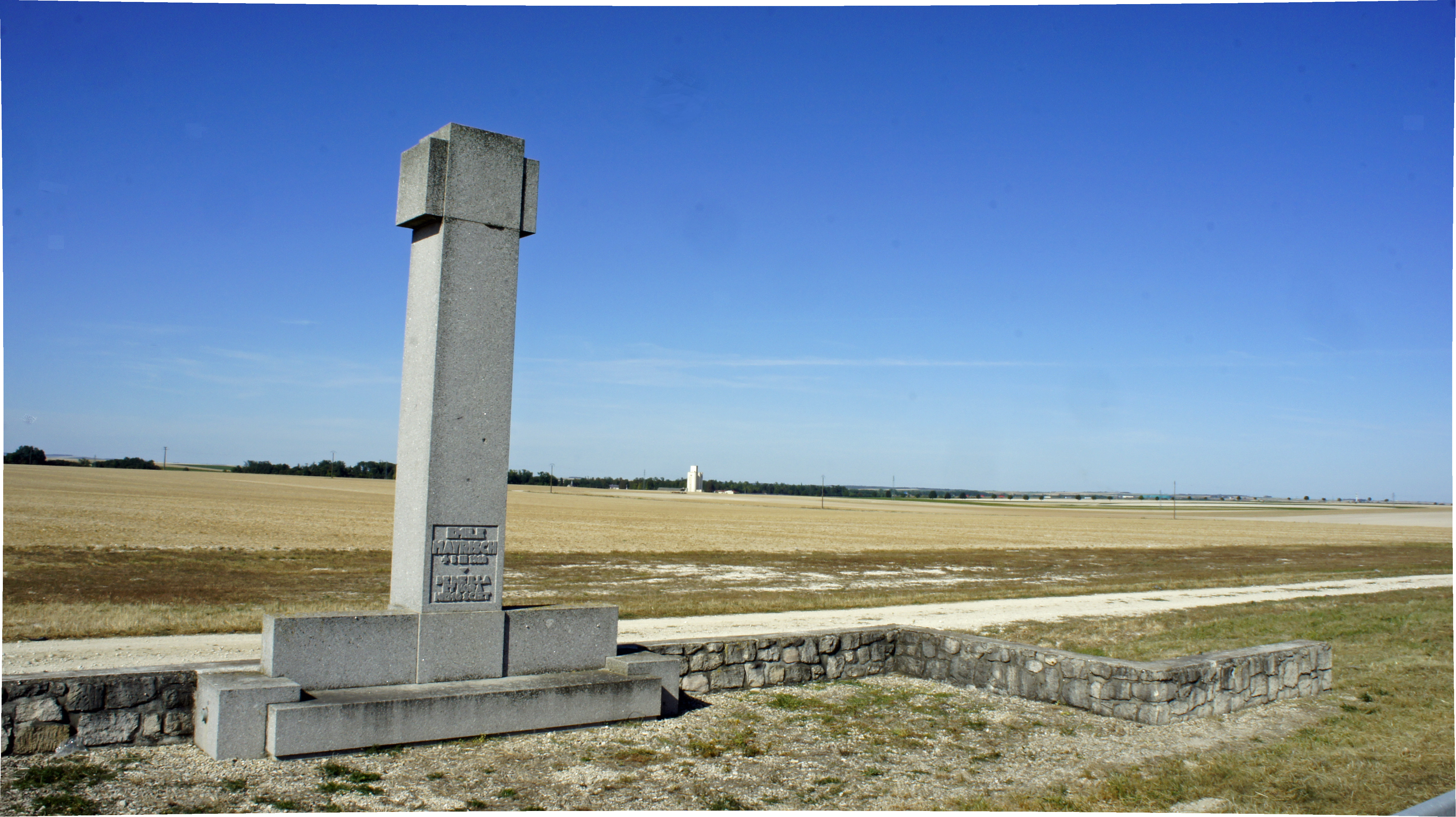 Vue du monument à Emile Mayrisch sur la D933.